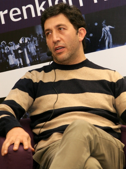 Emre Kınay